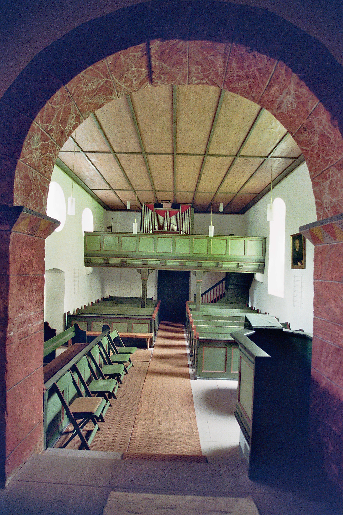 Orgel der Evangelischen Kirche Winnerod, Gemeinde Reiskirchen, Landkreis Gießen, Hessen, Deutschland